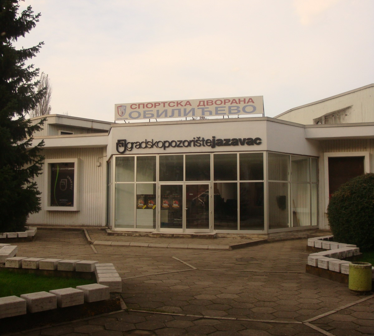 Спортска_дворана_Обилићево_и_Градско_позориште_Јазавац